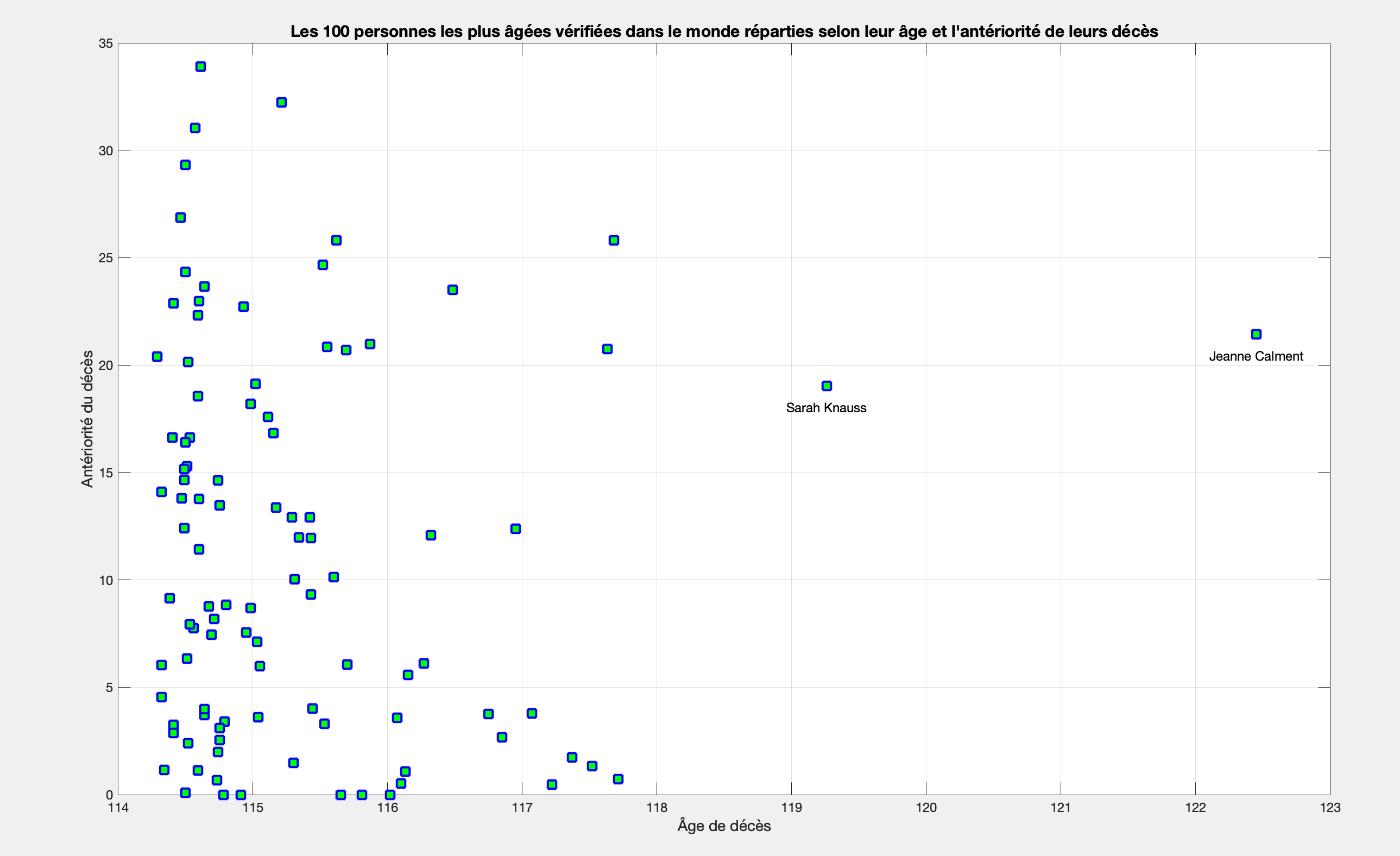 Les 100 personnes les plus âgées au monde réparties selon leur âge et l'antériorité de leur décès